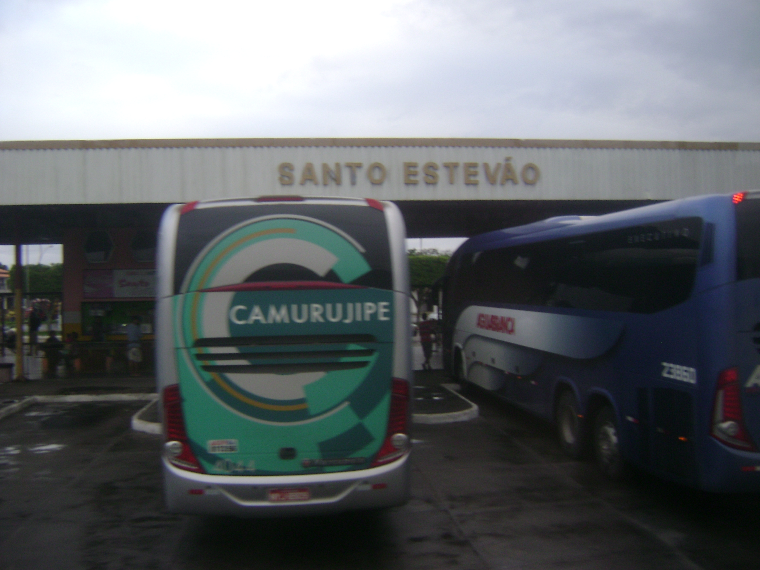 Rodoviária de Santo Estévão, na Bahia, Brasil.